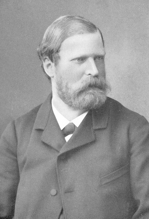 Ritratto dell'orientalista svizzero Albert Socin (1844-1899)